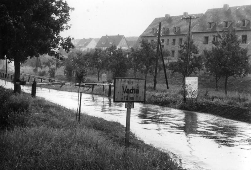 Zonengrenze bei Philippsthal (Werra) 1952 Information added by Wikimedia users.Fehler in der Beschreibung. Tatsächlich handelt es sich dabei um die Ortschaft Philippsthal (Werra) an der B62 die nach Vacha führt